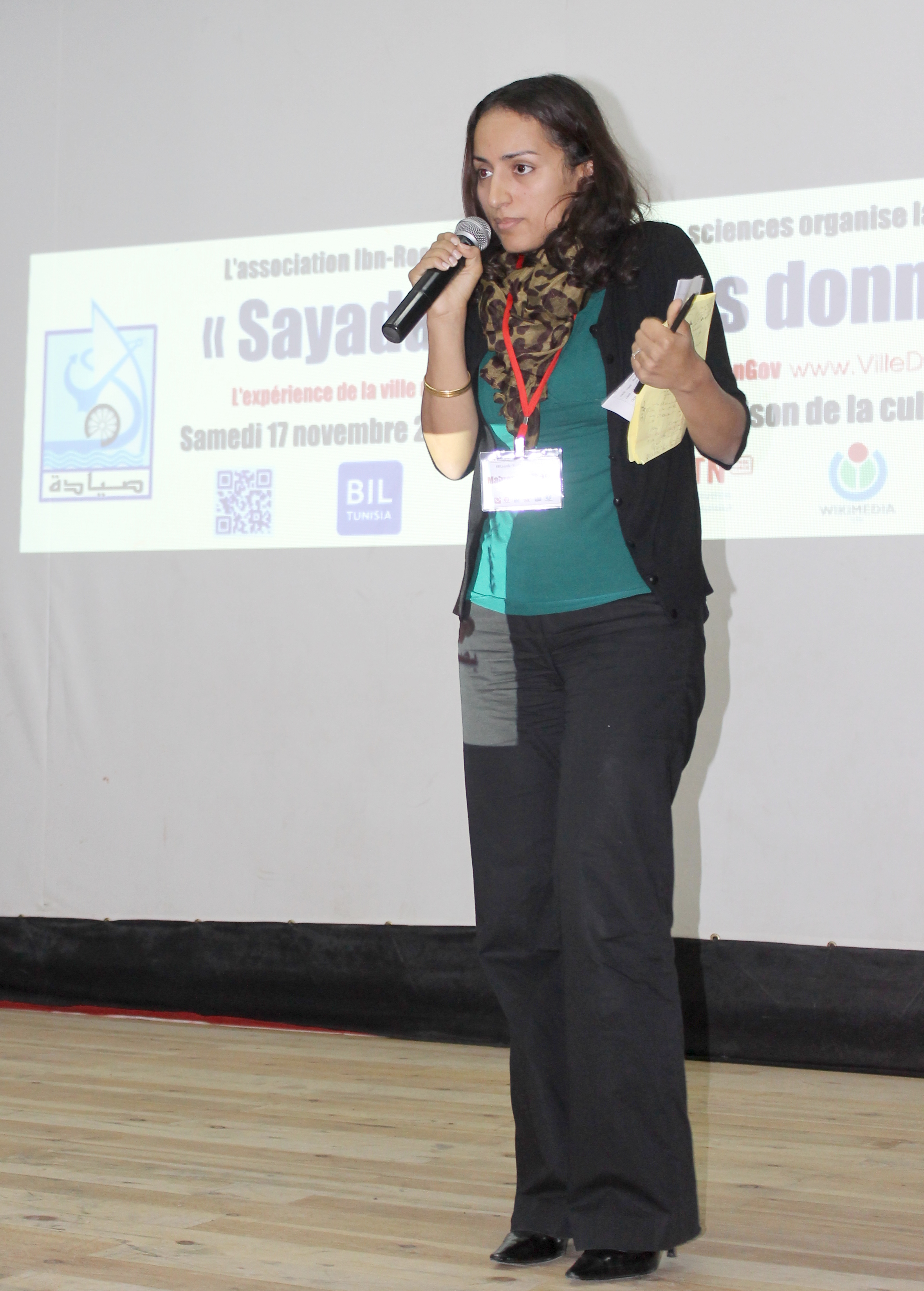 L'élue de l'Assemblée nationale constituante Mabrouka Mbarek parle dans la conférence BIL Sayada se l'OpenGov et l'OpenData